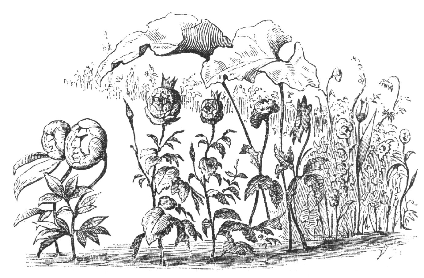 Illustration af tegneren Vilhelm Pedersen til H. C. Andersens eventyr "Den lille Idas blomster"